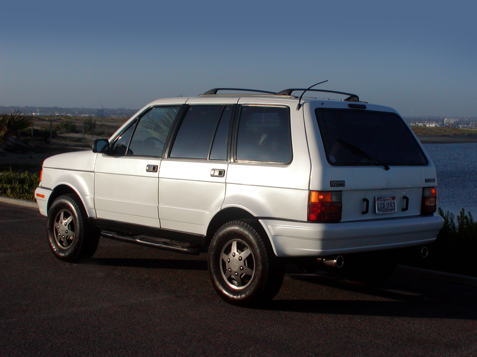 Laforza V8 1989 rear view